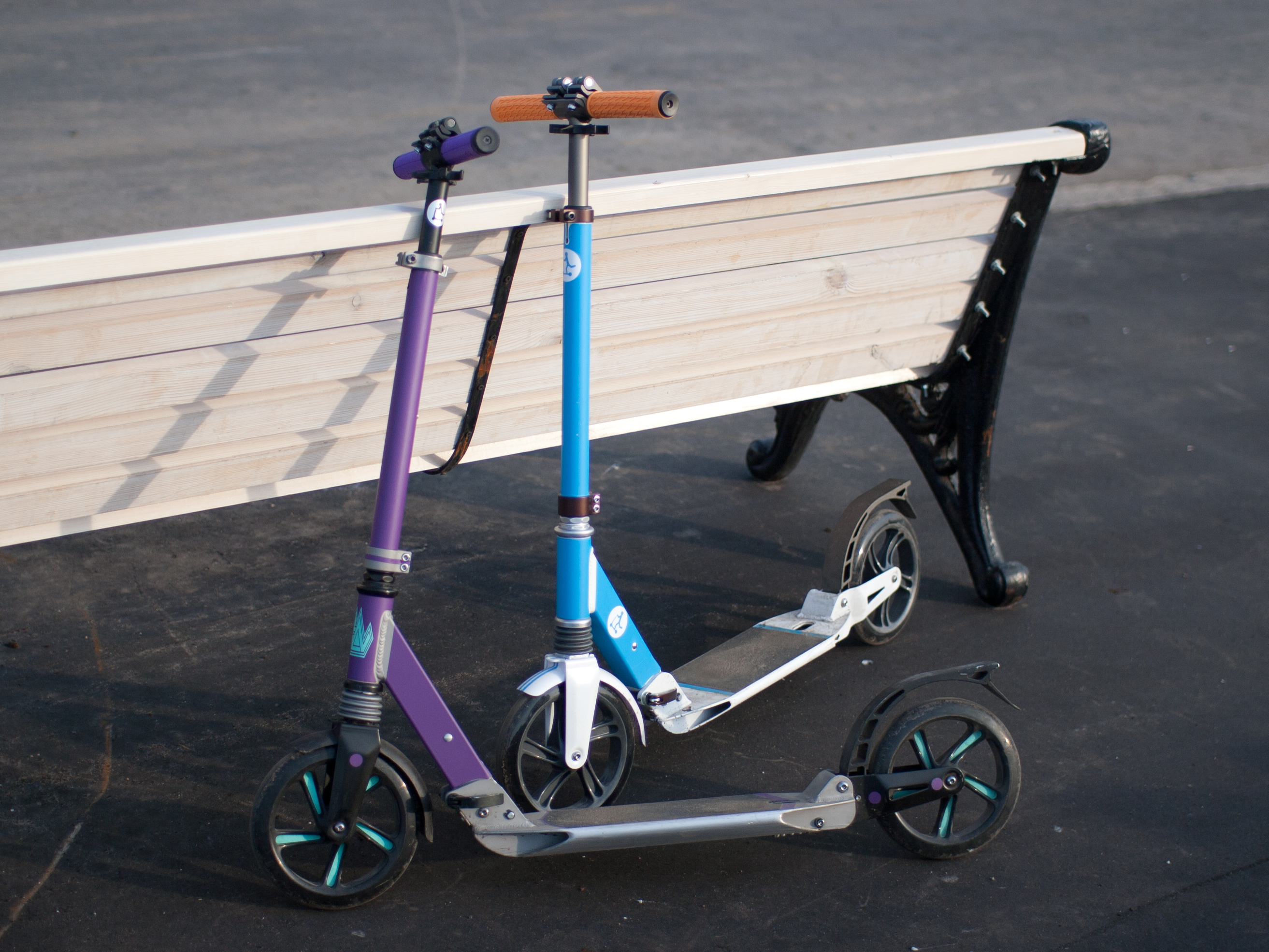 Классический городской самокат Oxelo Town7 XL